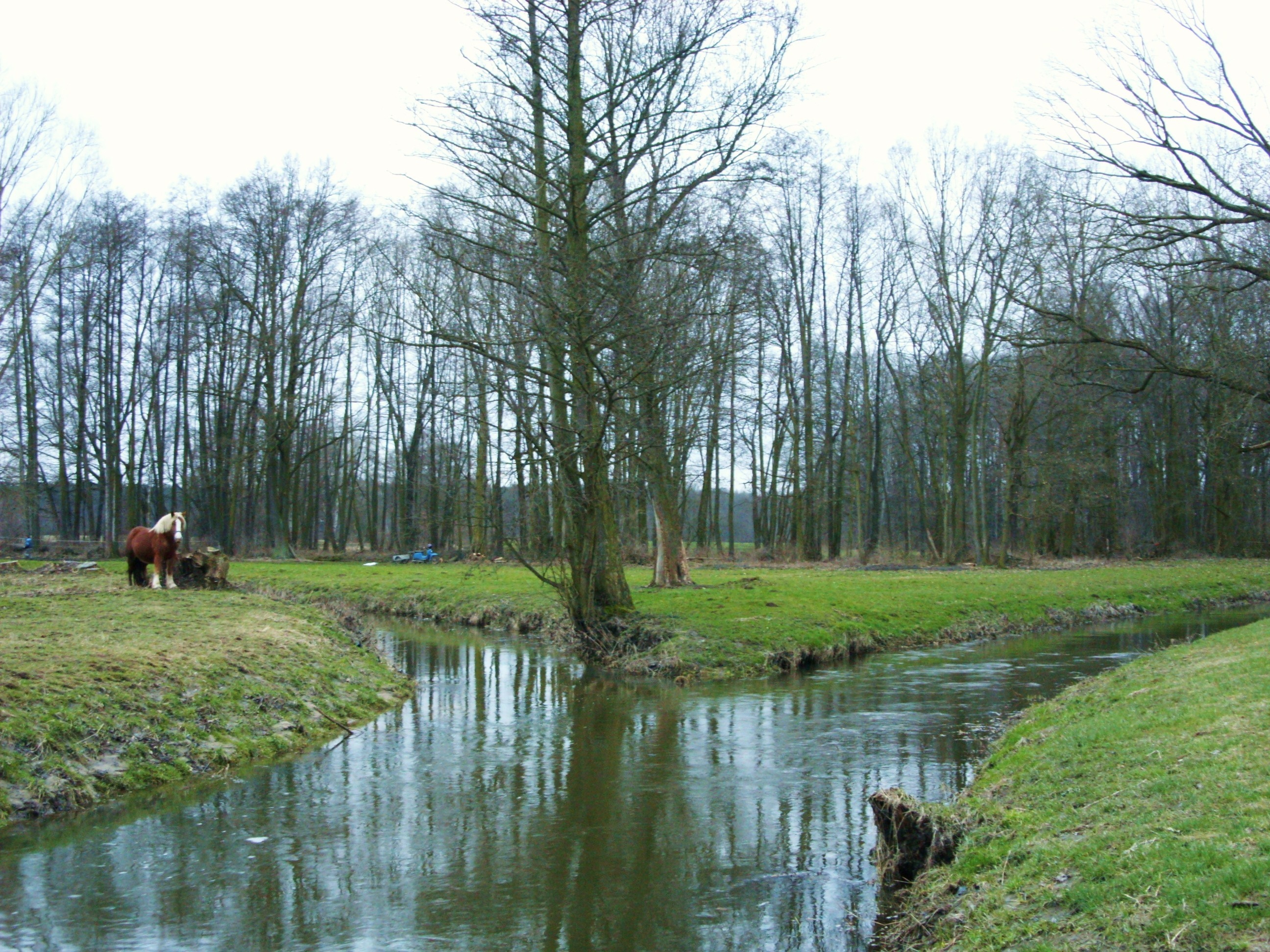 Mündung des Klosterwassers in die Schwarze Elster bei Kotten, Stadt Wittichenau, Landkreis Bautzen. Hornjoserbsce: Wuliwanje Klóšterskeje wody do Čorneho Halštrowa pola Koćiny, město Kulow, wokrjes Budyšin.